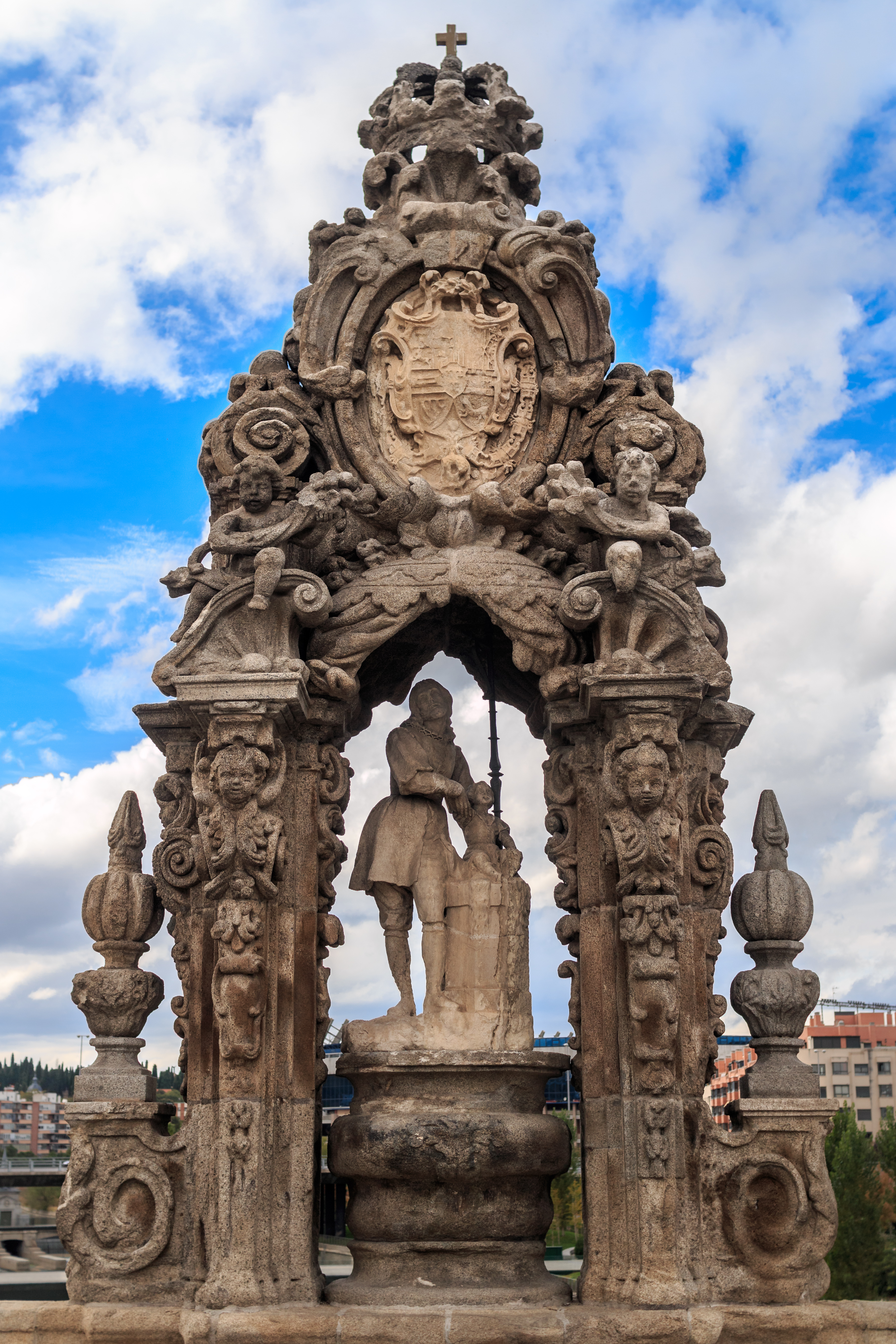 Hornacina con la imagen de San Isidro sobre el puente de Toledo, Madrid.